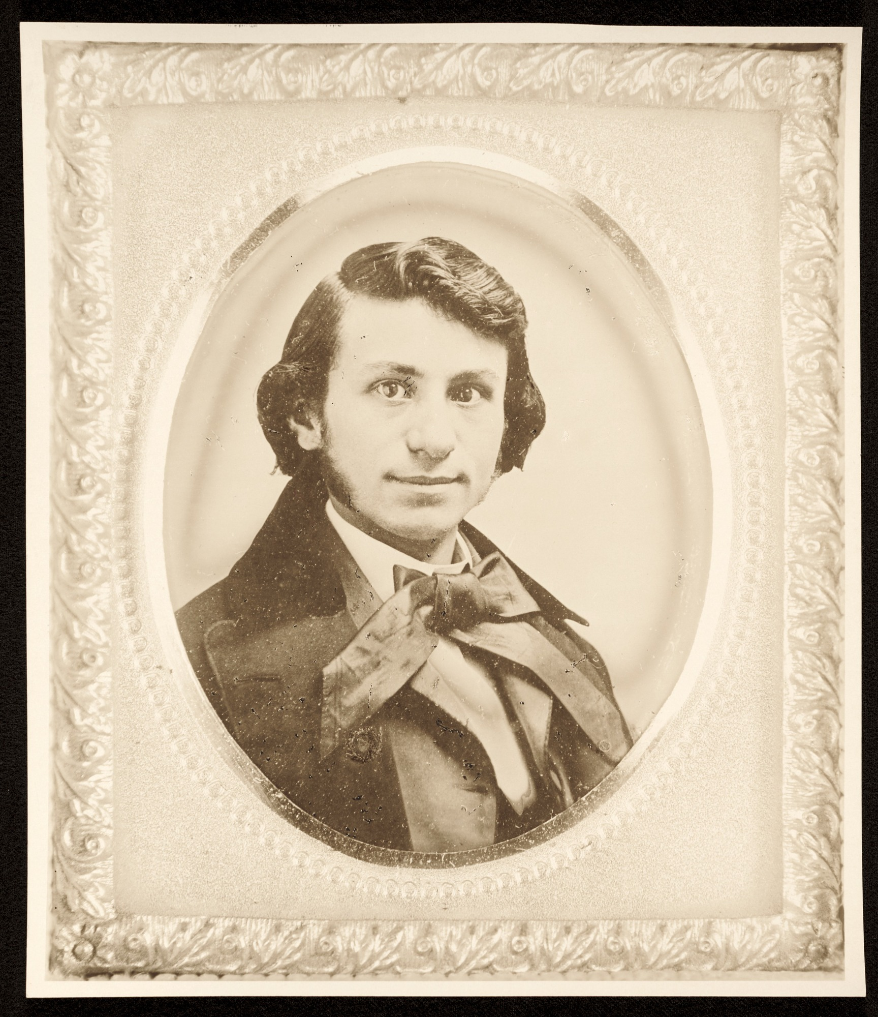 Louies Maurer *21. Februar 1832, †19. Juli 1932, Fotograf unbekannt, Fotodatum vor 1900